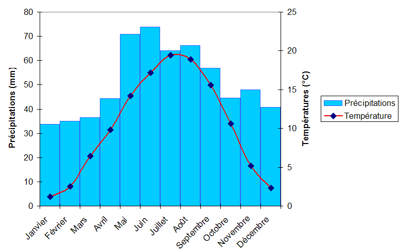 Graphique des précipitations et des températures à Strasbourg. Moyennes entre 1949 et 2001. Source des données : Propre travail. Réalisé avec Microsoft Excel.